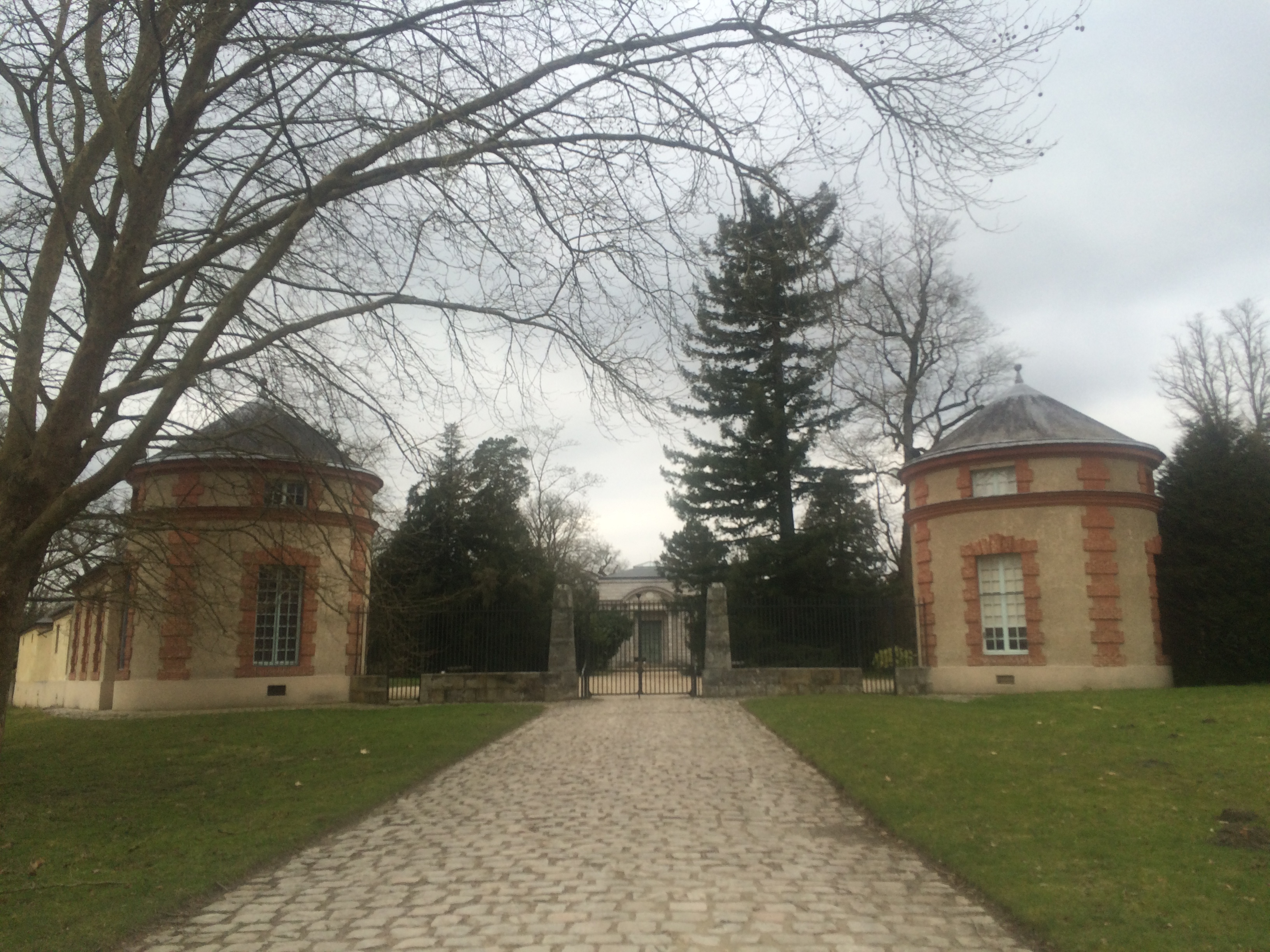 L'accès à la laiterie de la reine.